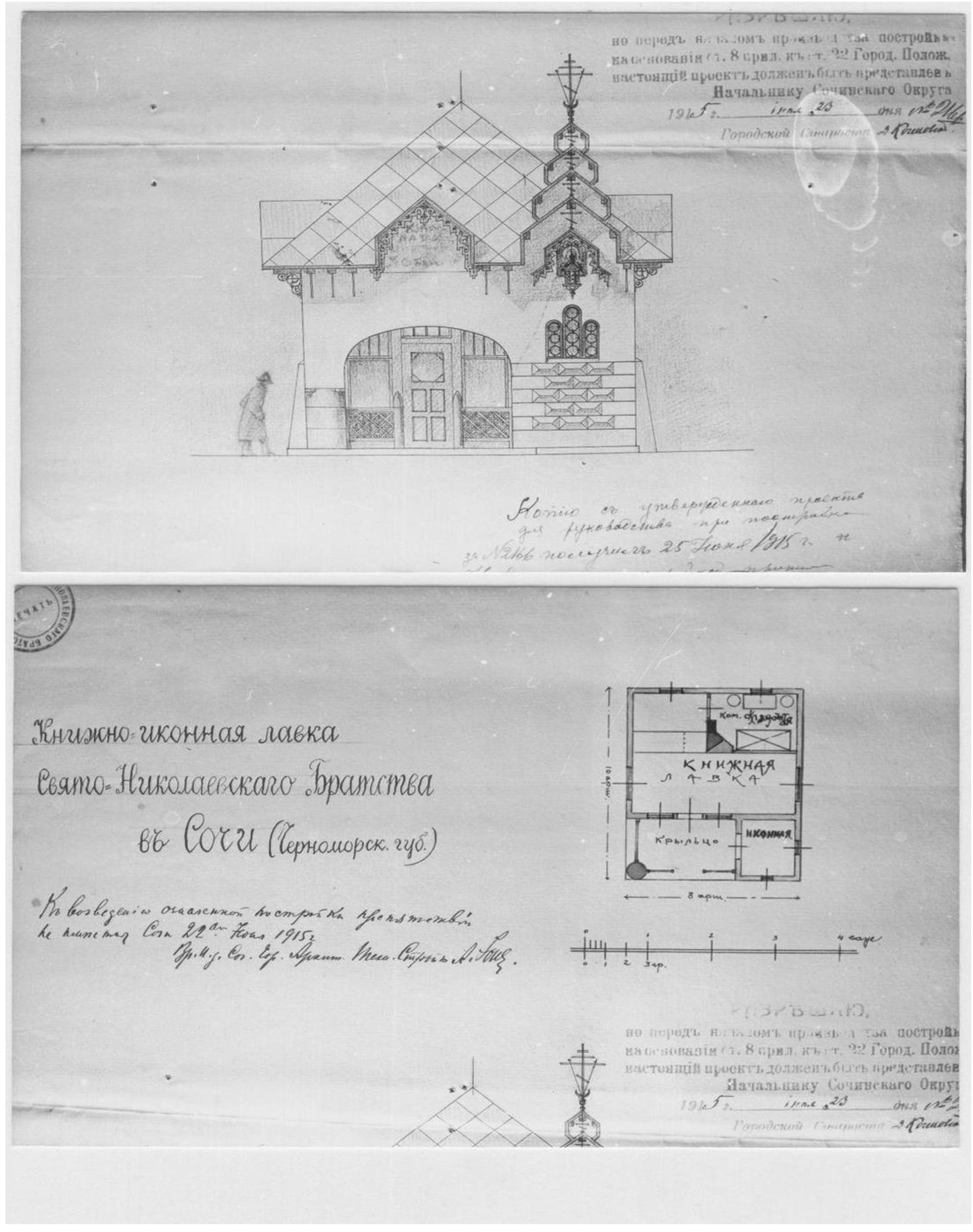 Проект Книжницы часовни на старосочинском базаре